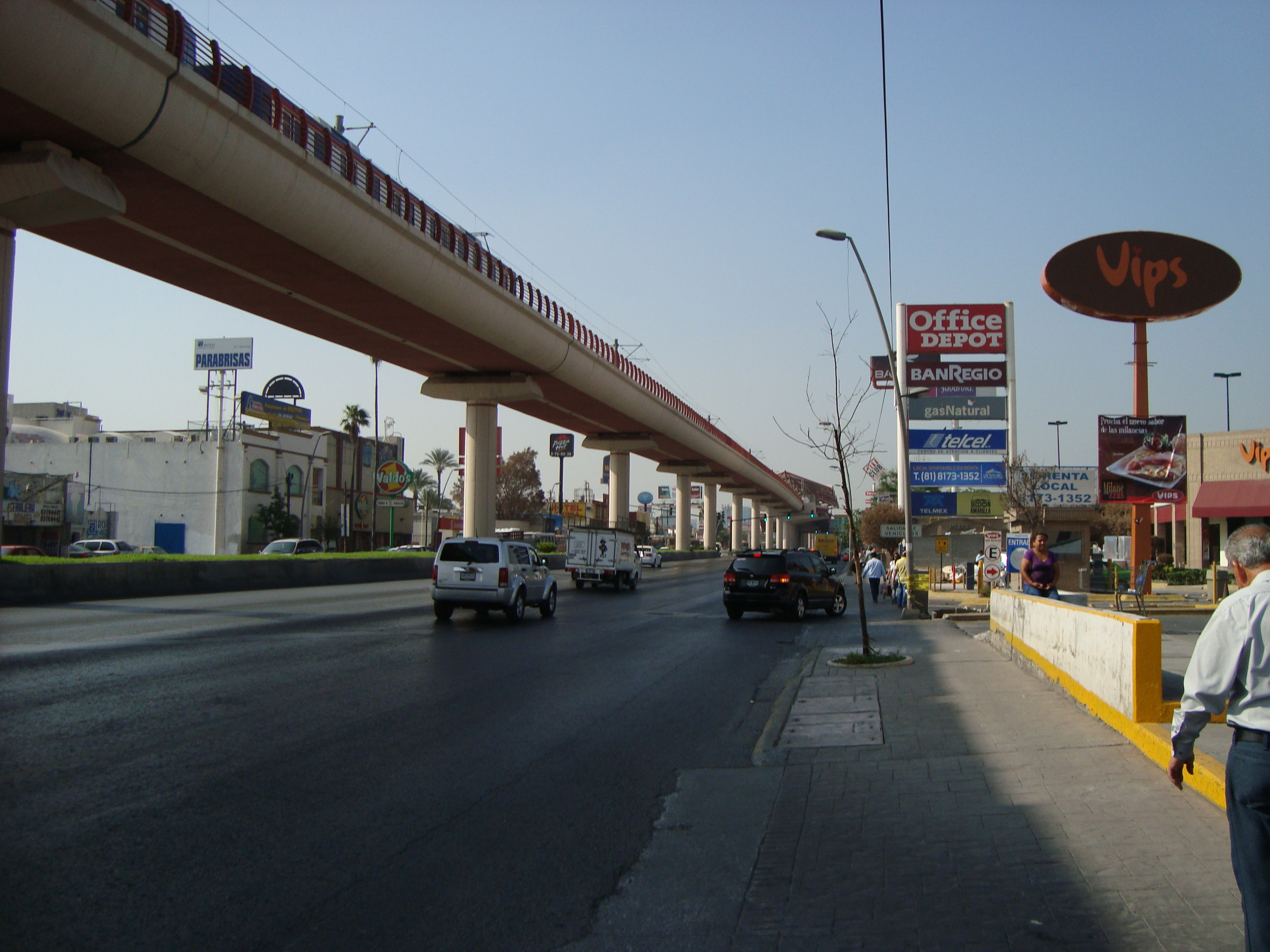 Avenida Universidad y Monterrey Metro en San Nicolás de los Garza, estado de Nuevo León.